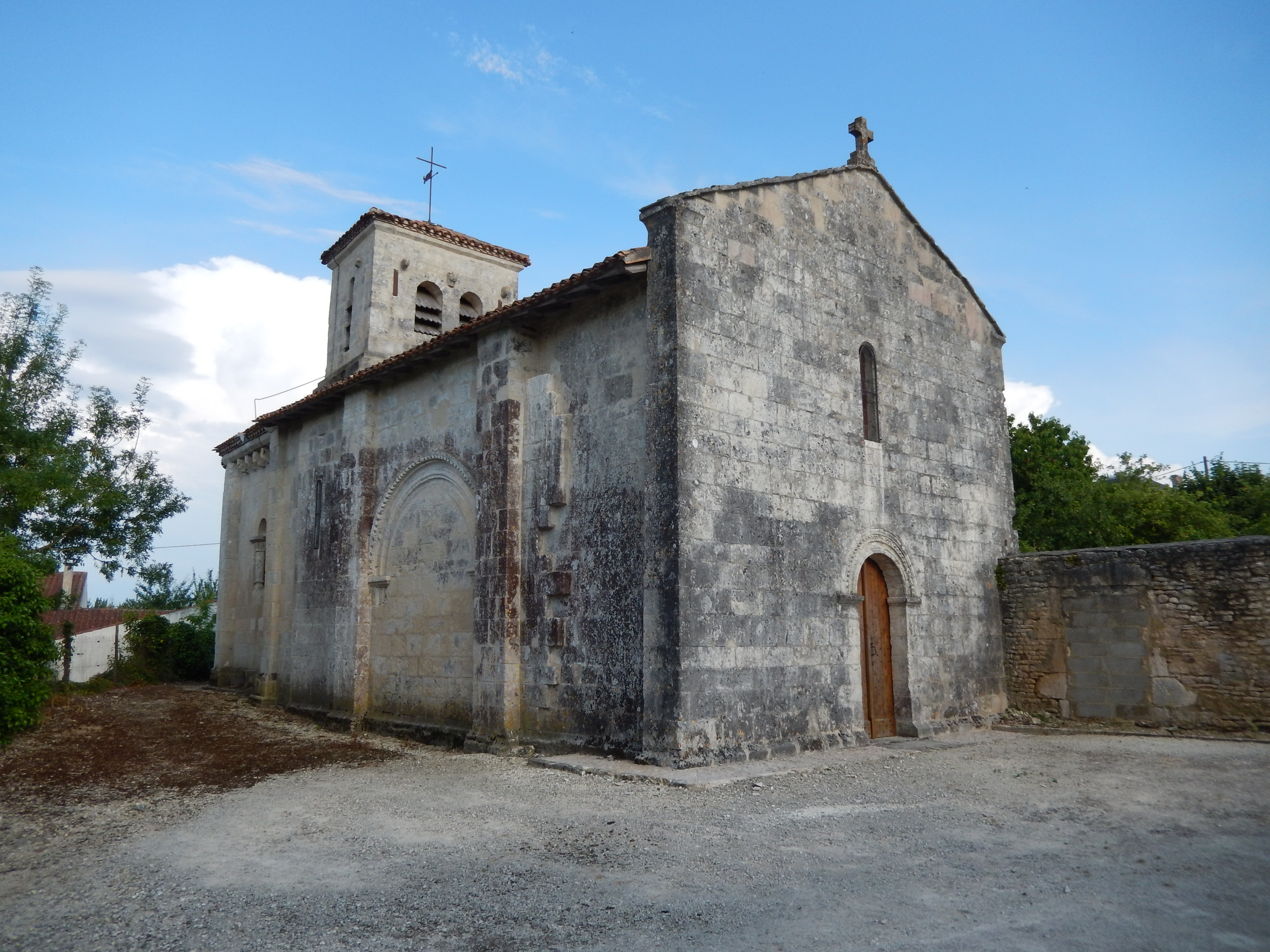 Saint Martin de Juillers, Charente-Maritime, France. • L'Église Saint-Martin, construite dès le onzième siècle.